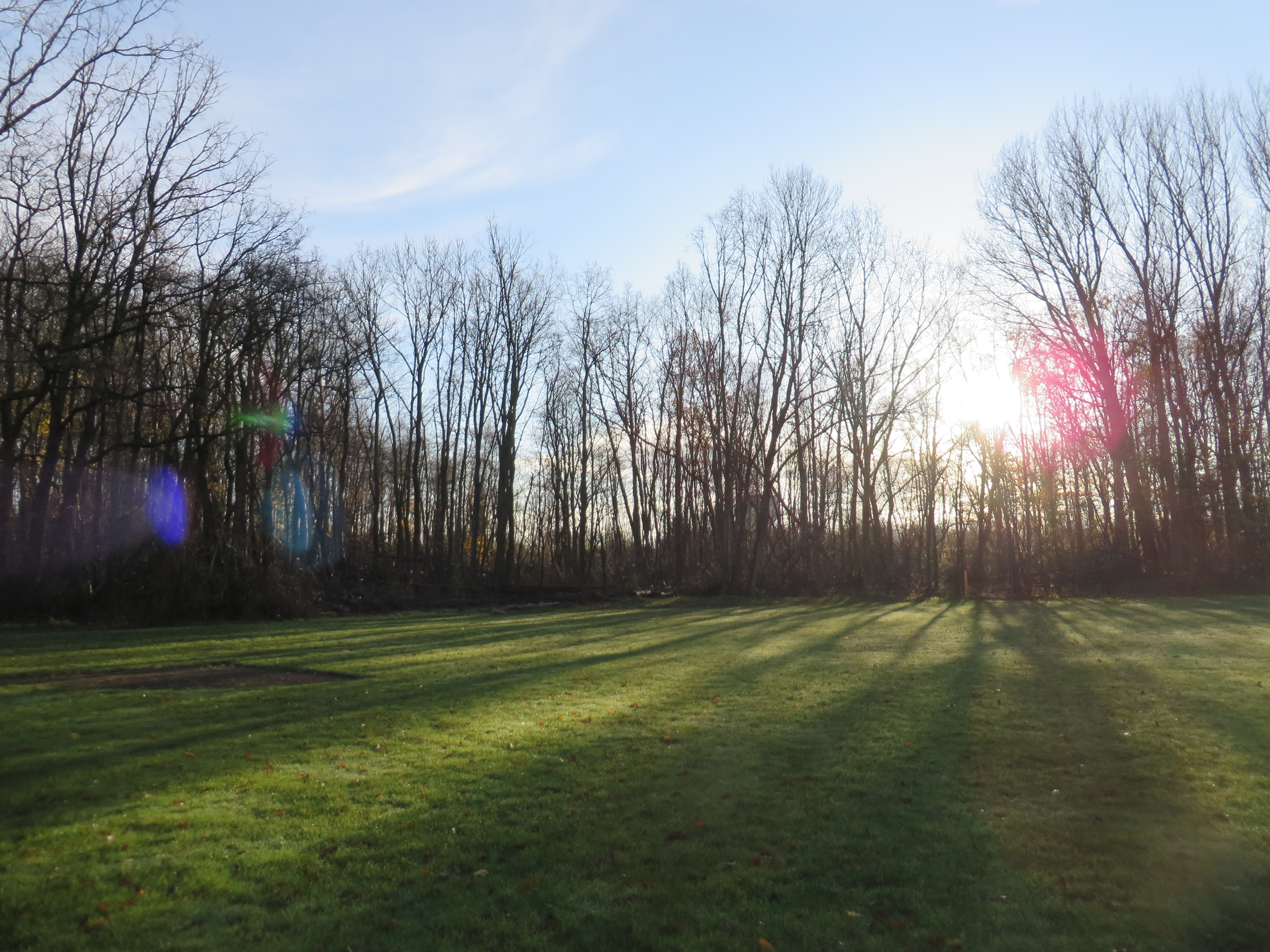 Ehrenhain (Flensburg-Mürwik-Fruerlund 2017), Bild 10